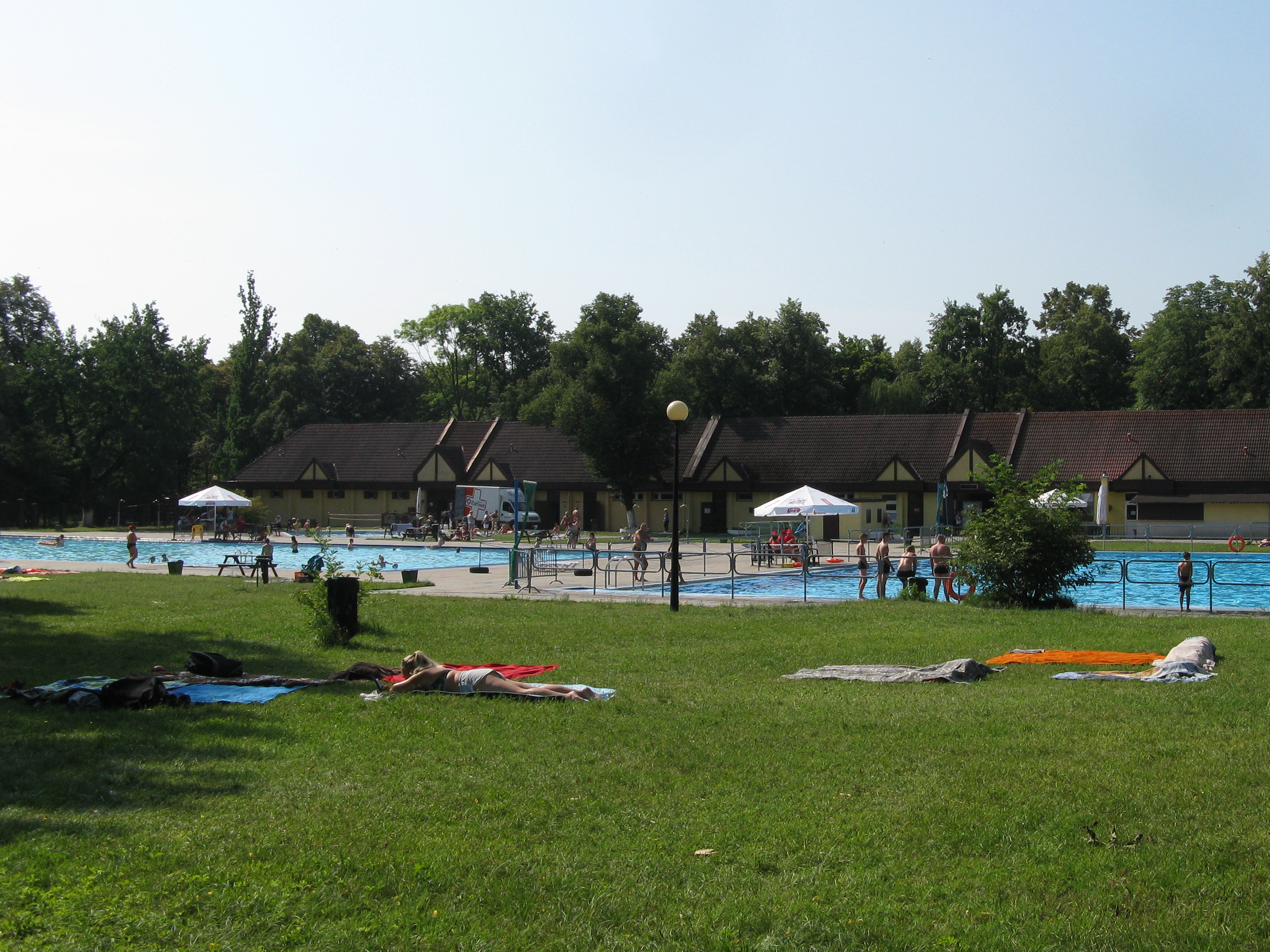 Baseny odkryte Ośrodka Sportu i Rekreacji w parku miejskim im. Franciszka Kachla w Bytomiu.